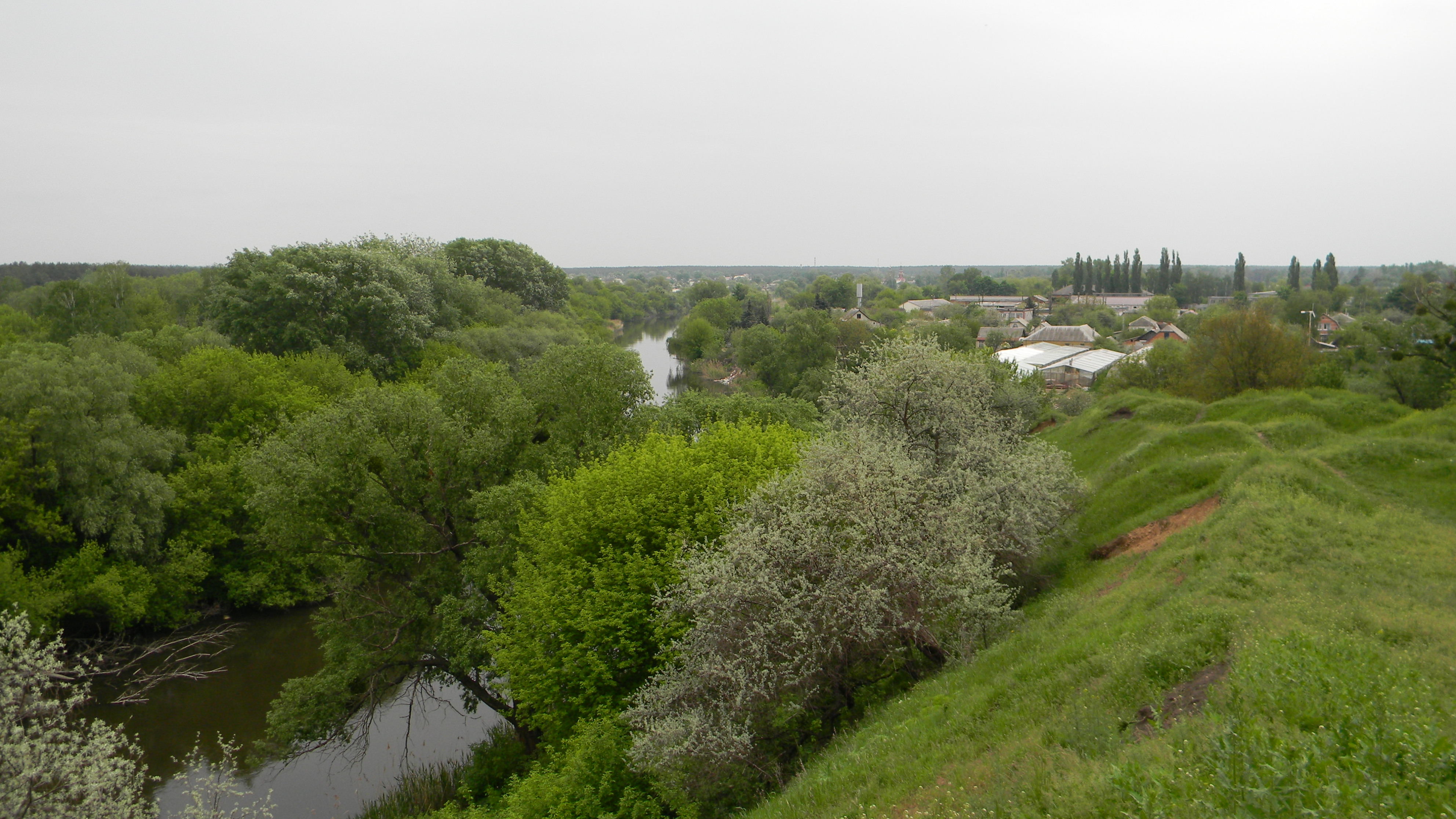 Донецкое городище. Вид на реку в сторону Карачёвки (по течению) с детинца Донецкого городища.